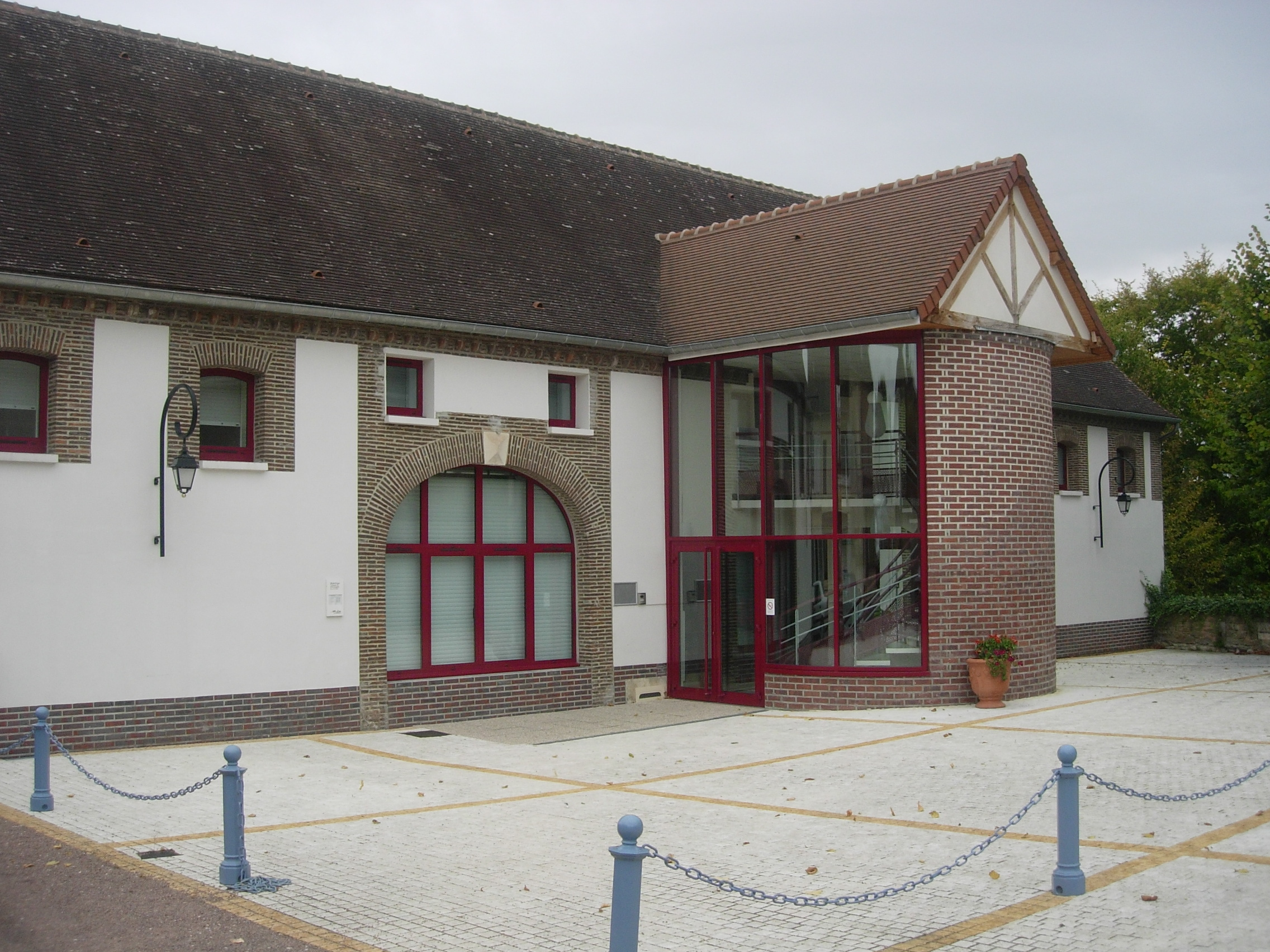 Bibliothèque d'Ervy